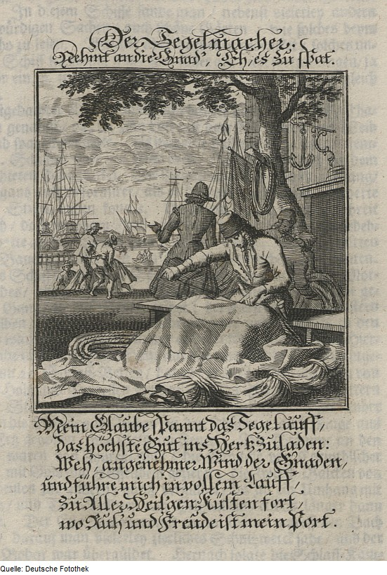 Original image description from the Deutsche Fotothek Ständebuch & Beruf & Handwerk & Segel